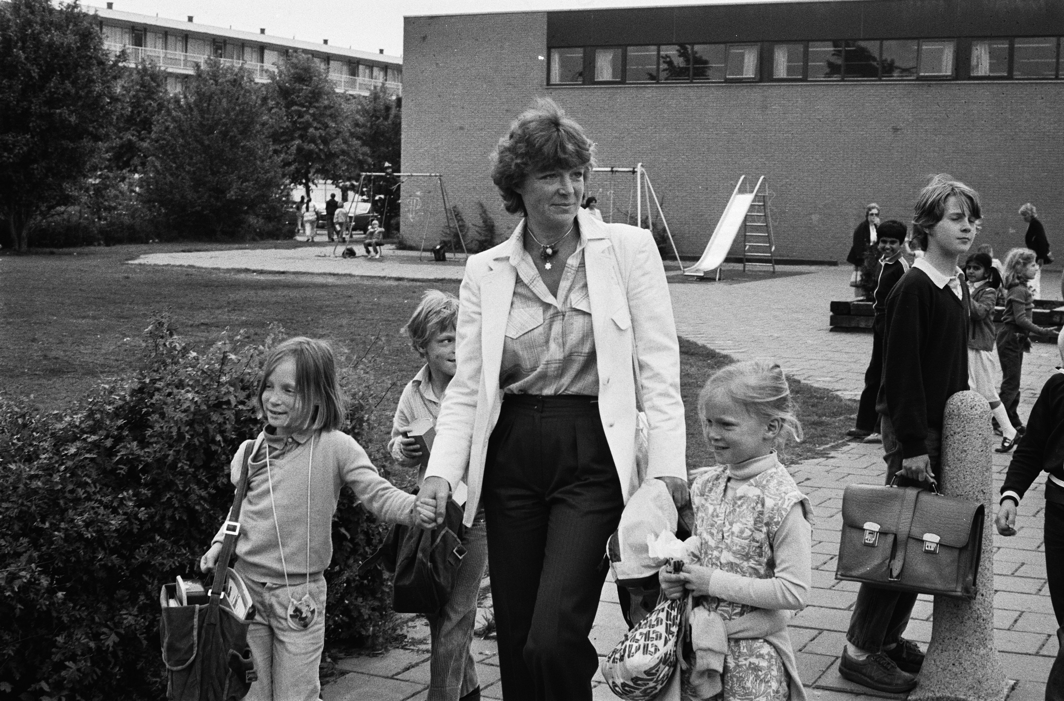 Collectie / Archief : Fotocollectie Anefo Reportage / Serie : [ onbekend ] Beschrijving : Scheiding Prinses Irene en Carel Hugo uitgesproken; Irene haalt haar kinderen Margarita, Maria Carolina en Jaime Bernardo Datum : 26 mei 1981 Trefwoorden : Kinderen, scheidingen, scholen Persoonsnaam : Carel Hugo, Irene, prinses, Margarita, prinses Fotograaf : Croes, Rob C. / Anefo Auteursrechthebbende : Nationaal Archief Materiaalsoort : Negatief (zwart/wit) Nummer archiefinventaris : bekijk toegang 2.24.01.05 Bestanddeelnummer : 931-5076